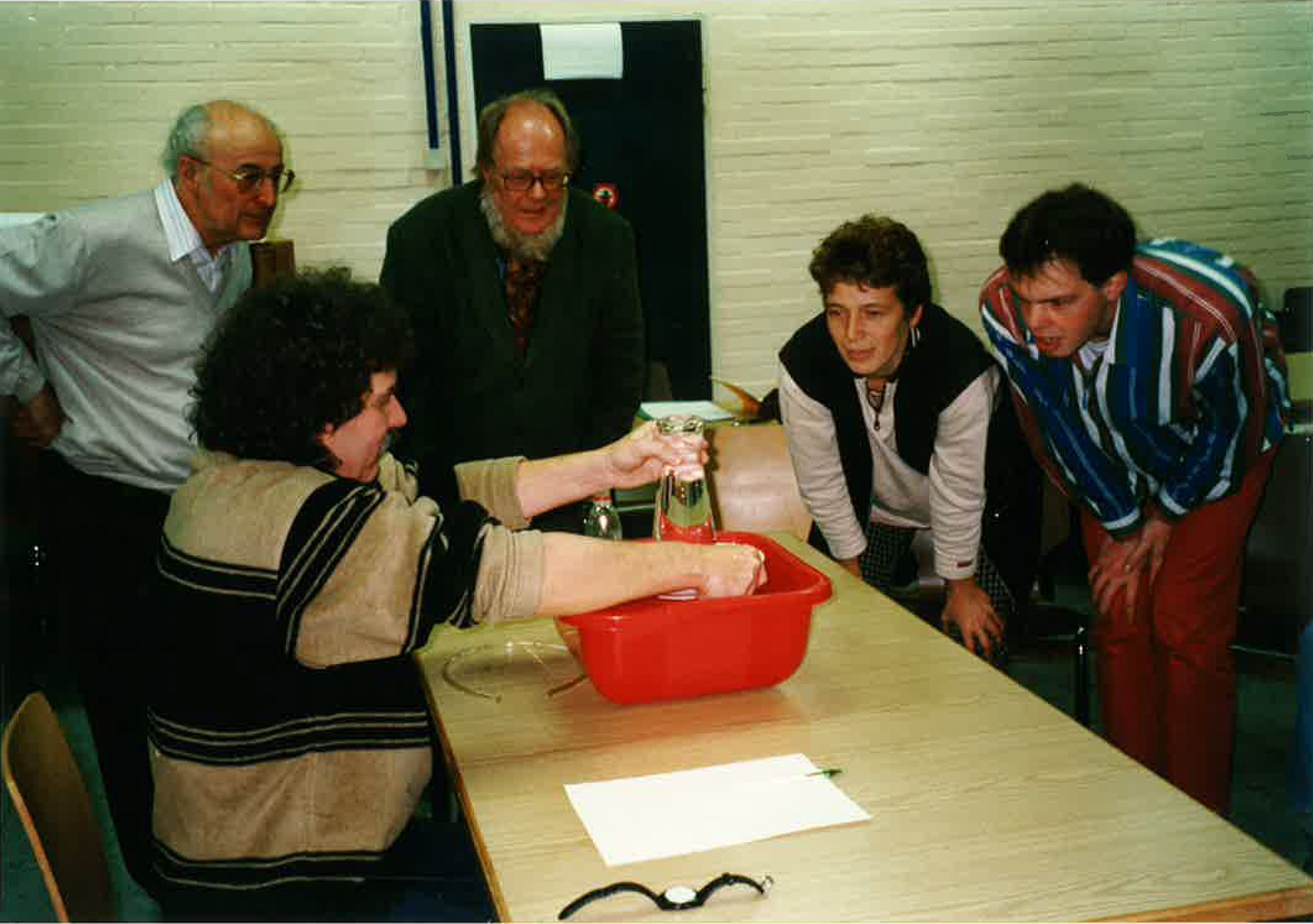 Wolfgang Klafki (links) und Hans Christoph Berg (Mitte) bei einer Vorführung des Lehrstücks "Pascals Barometer" durch Ueli Aeschlimann (halblinks) im Dezember 1997. Halbrechts und rechts die damaligen Studierenden Barbara Krzensk und Markus Will.